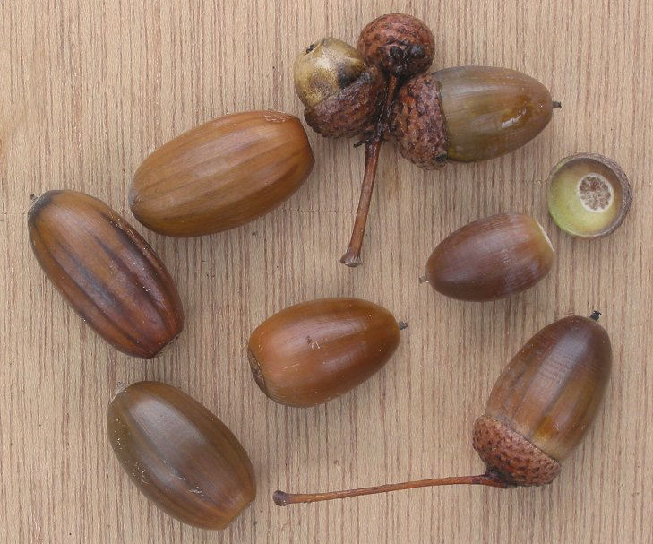 zelfgemaakte foto van eikels van de Zomereik; half oktober